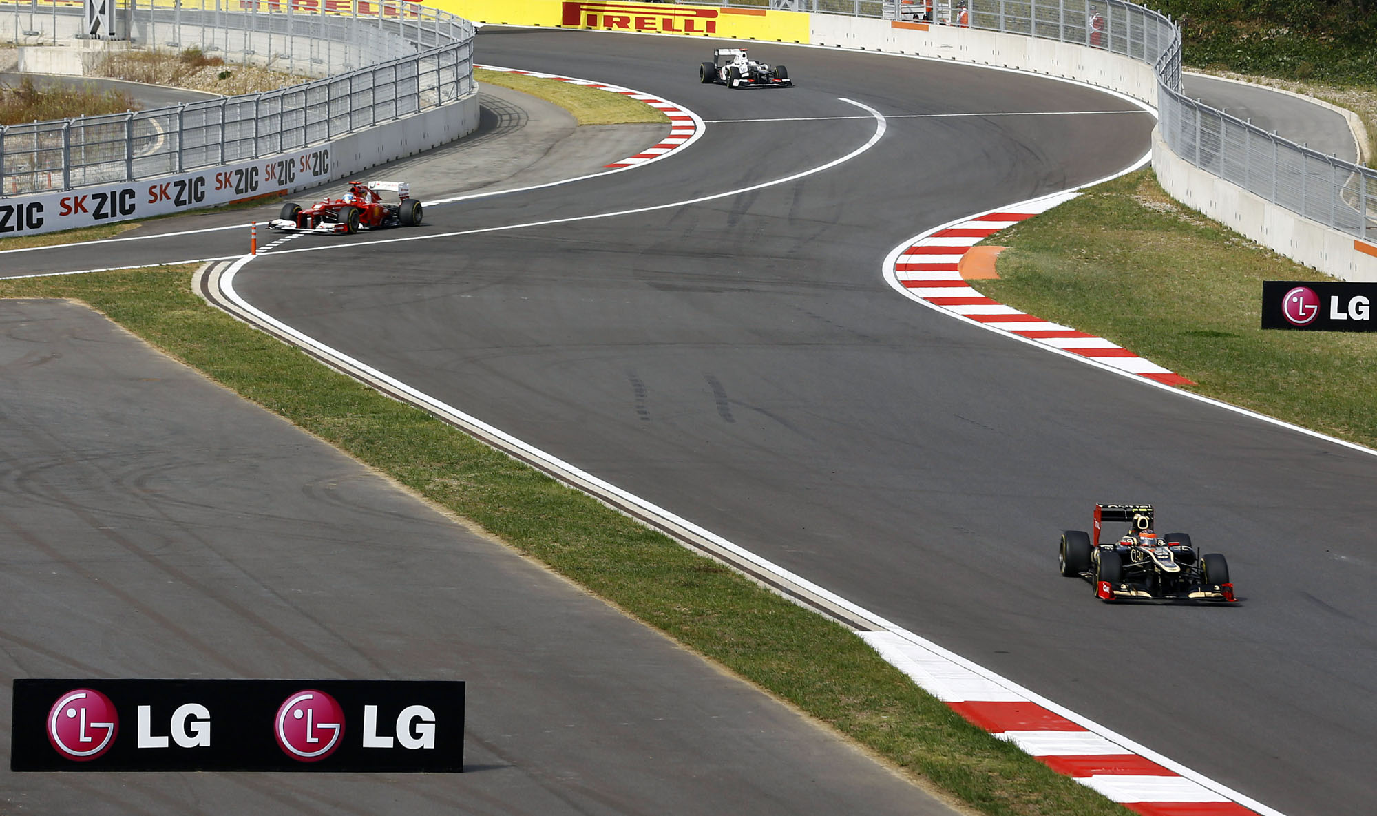 LG전자가 12일~14일 전남 영암에서 열린 ‘2012 F1™ 코리아그랑프리’ 경기에서 글로벌 브랜드 파워를 과시하며 전 세계 F1™ 팬들을 사로잡았다.